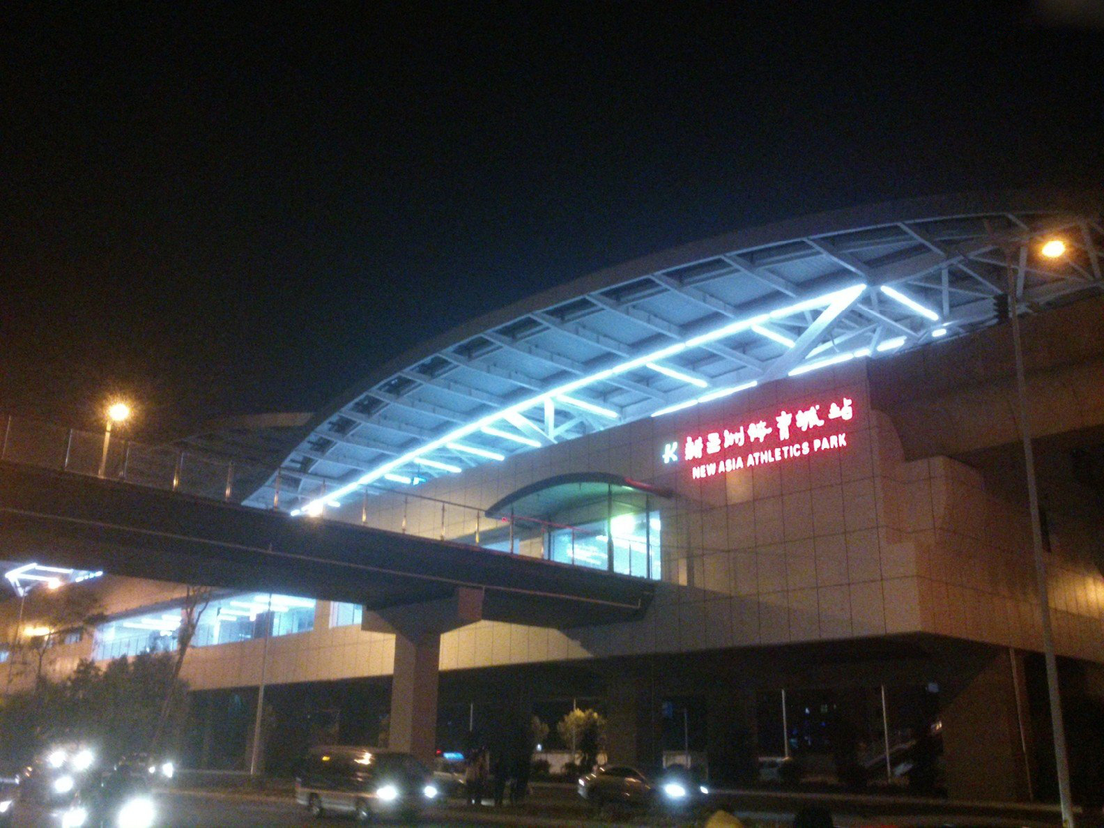 新亚洲体育城站，昆明轨道交通1号线